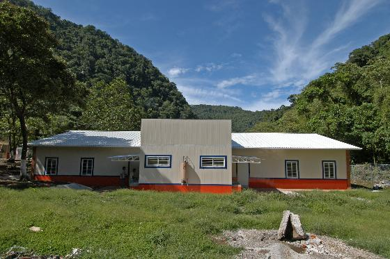 Escuela Unión y Progreso en Cerro Central